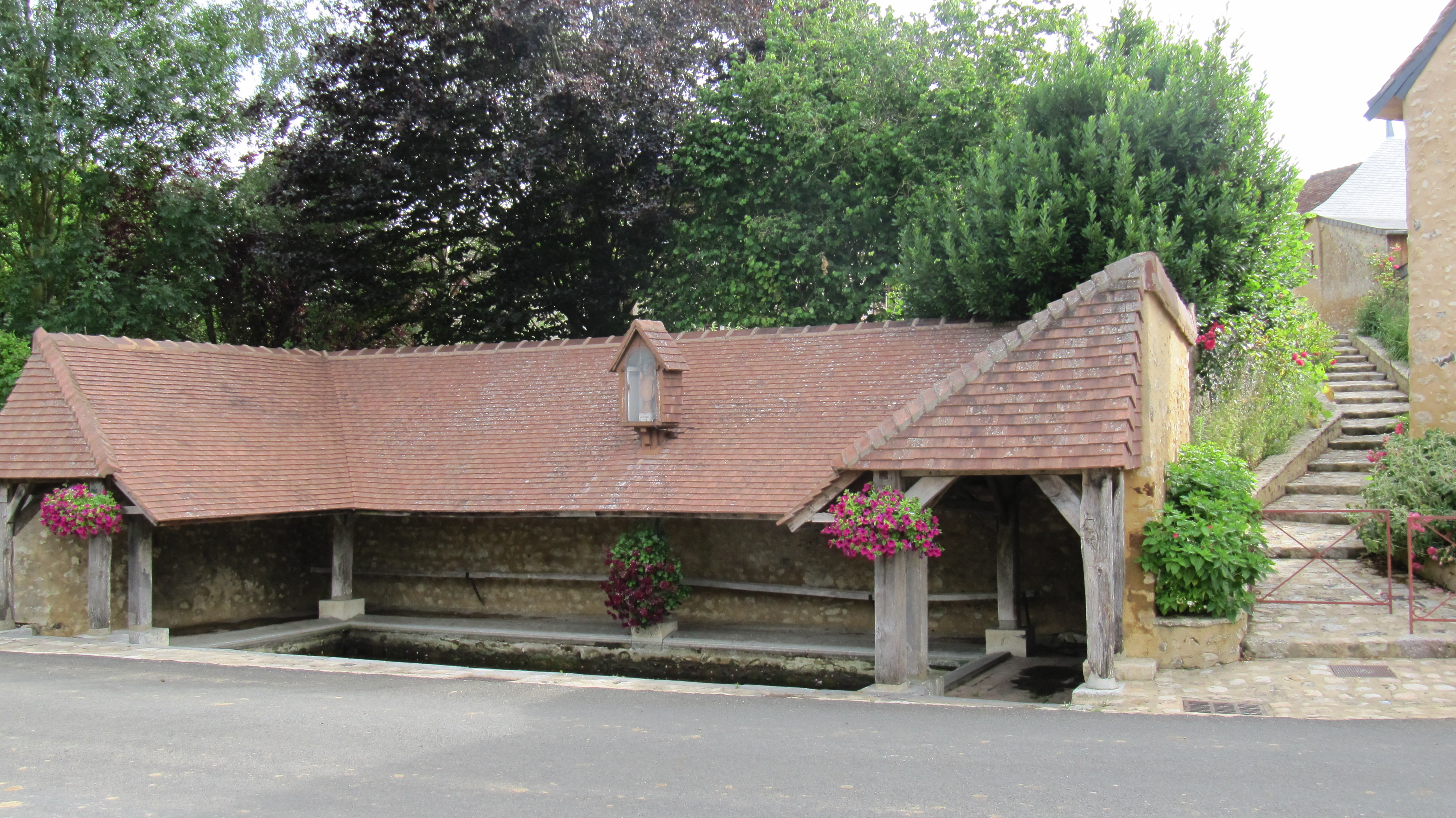 Alimenté par une source, le lavoir a été construit à la fin du 19e s.